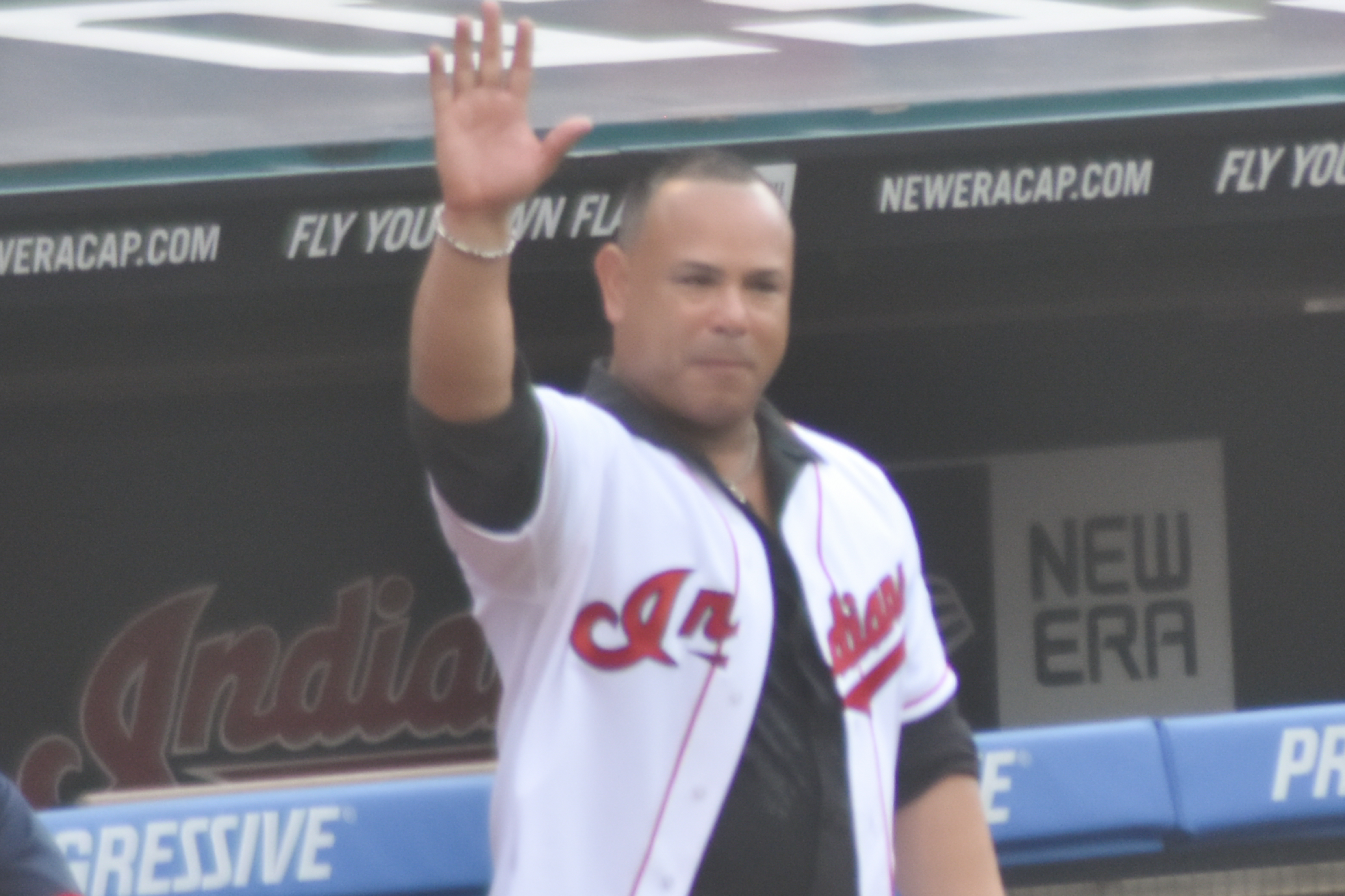 Carlos Baerga